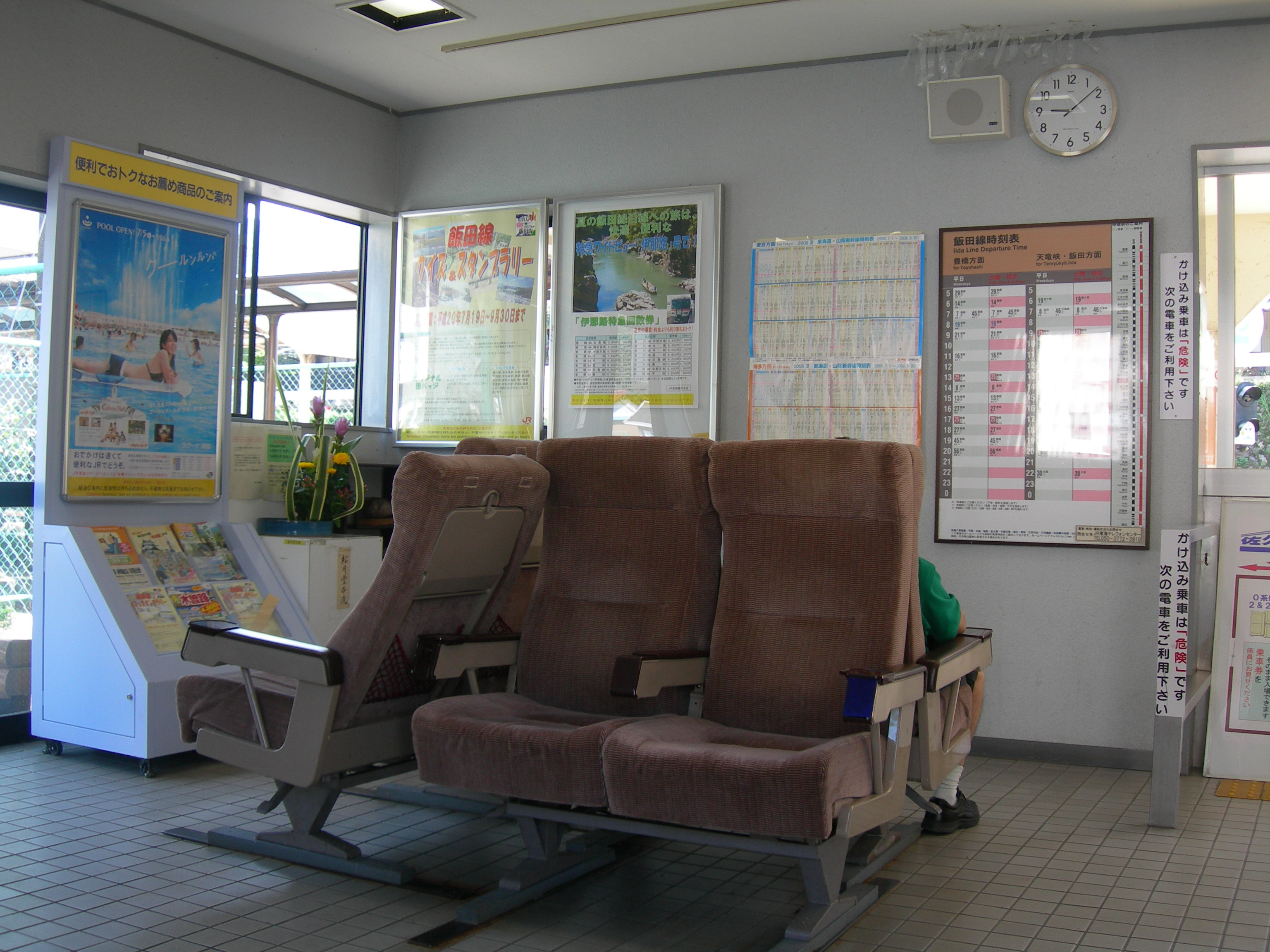 中部天竜駅改札にある新幹線の座席を利用した待合室